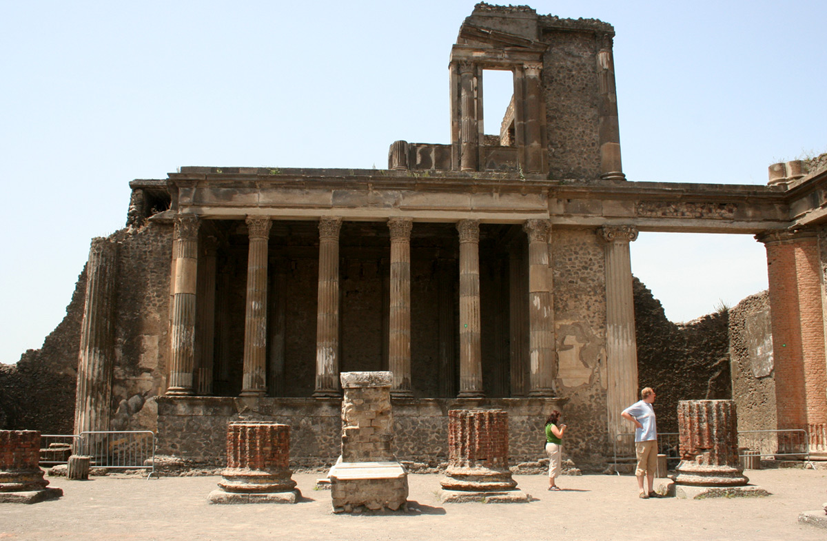 Pompeii Basilica